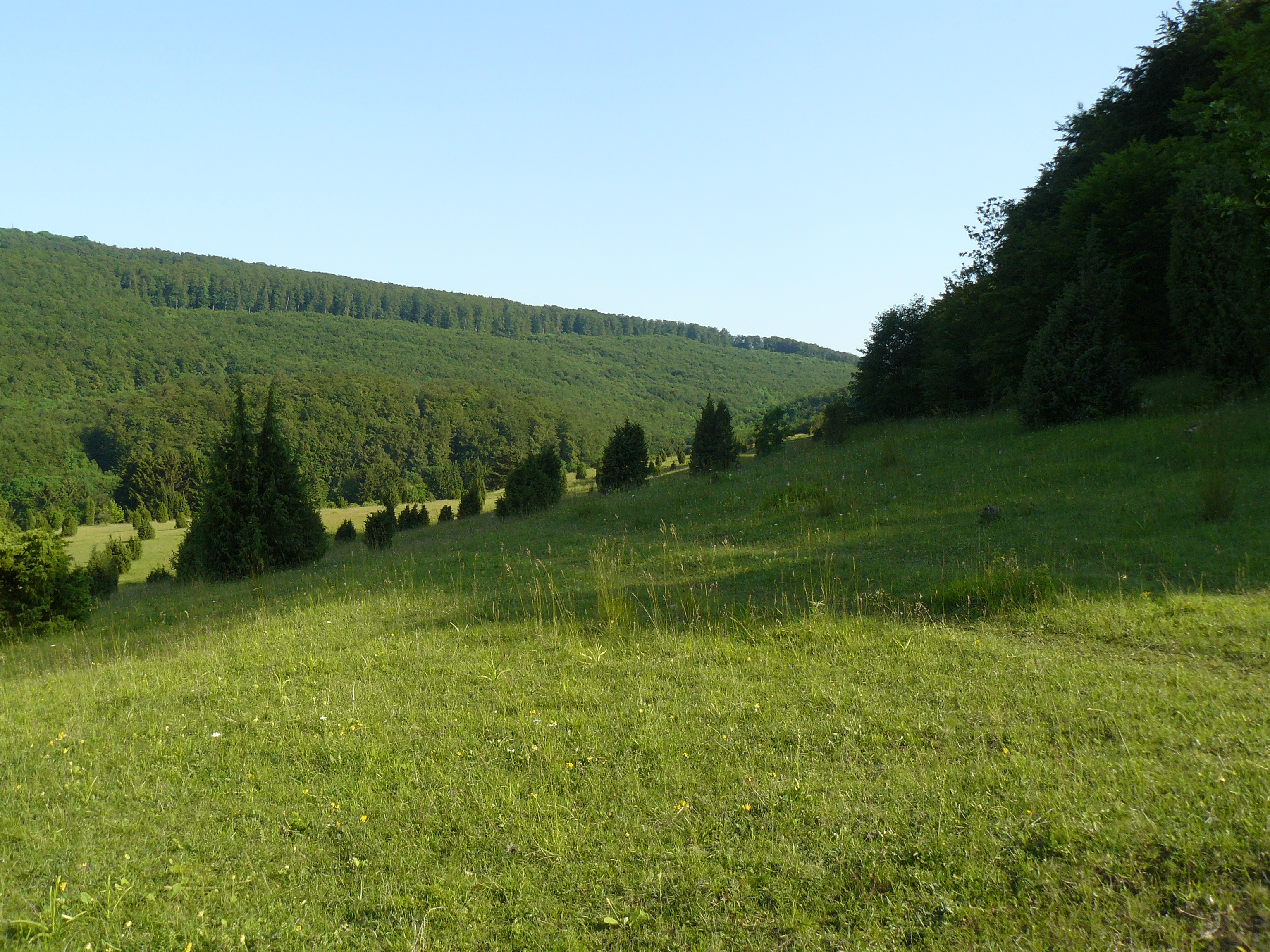 Im Vordergrund sind die Wacholdersträuche auf dem (Halb-) Trockenrasen des Nordhangs des NSGs Wiesenthaler Schweiz zu sehen. Das Foto zeigt einen Blick auf das Horn und die Stoffelskuppe.